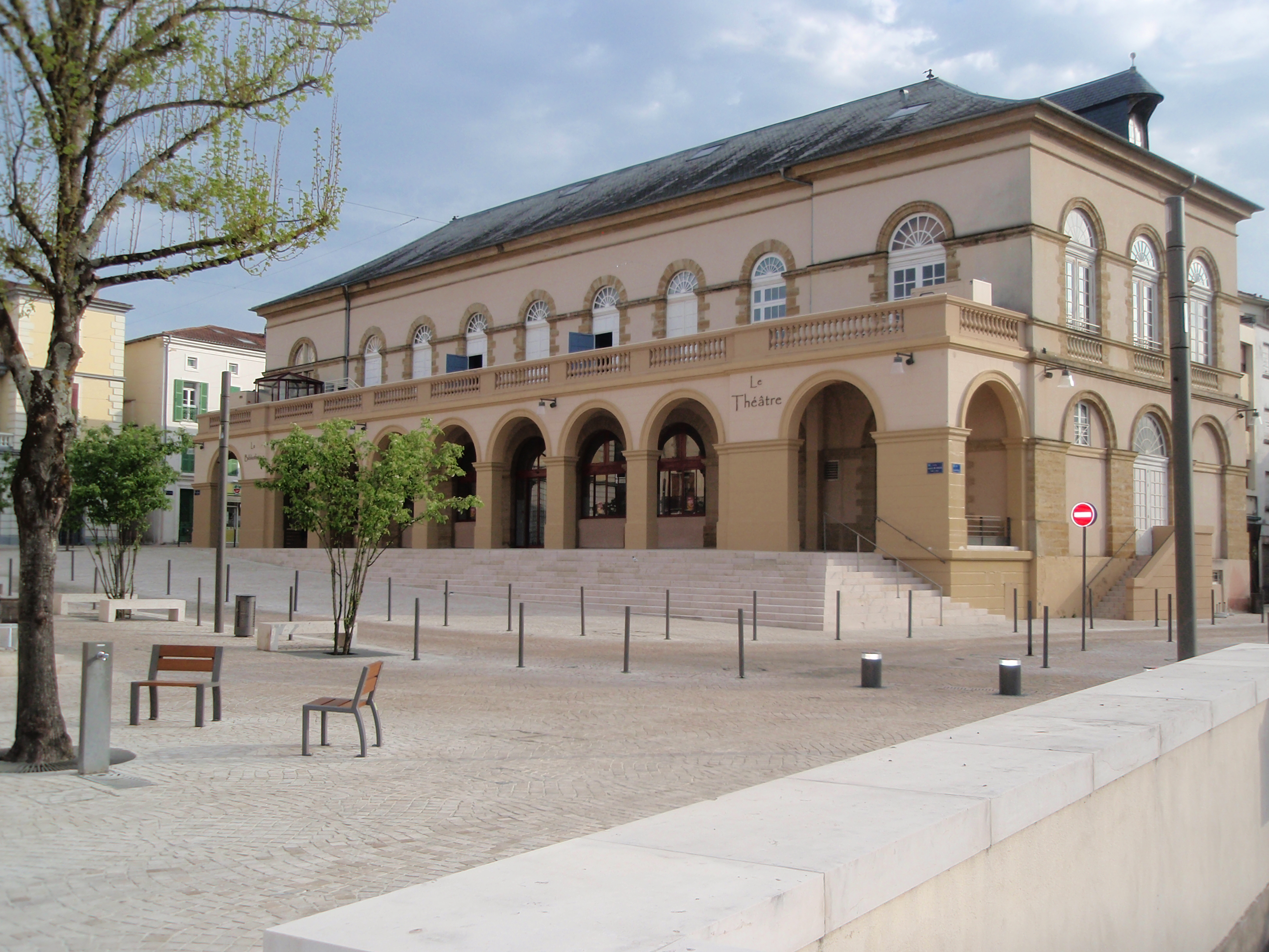 Le théâtre et la place Charles de Gaulle à Mont-de-Marsan (40)